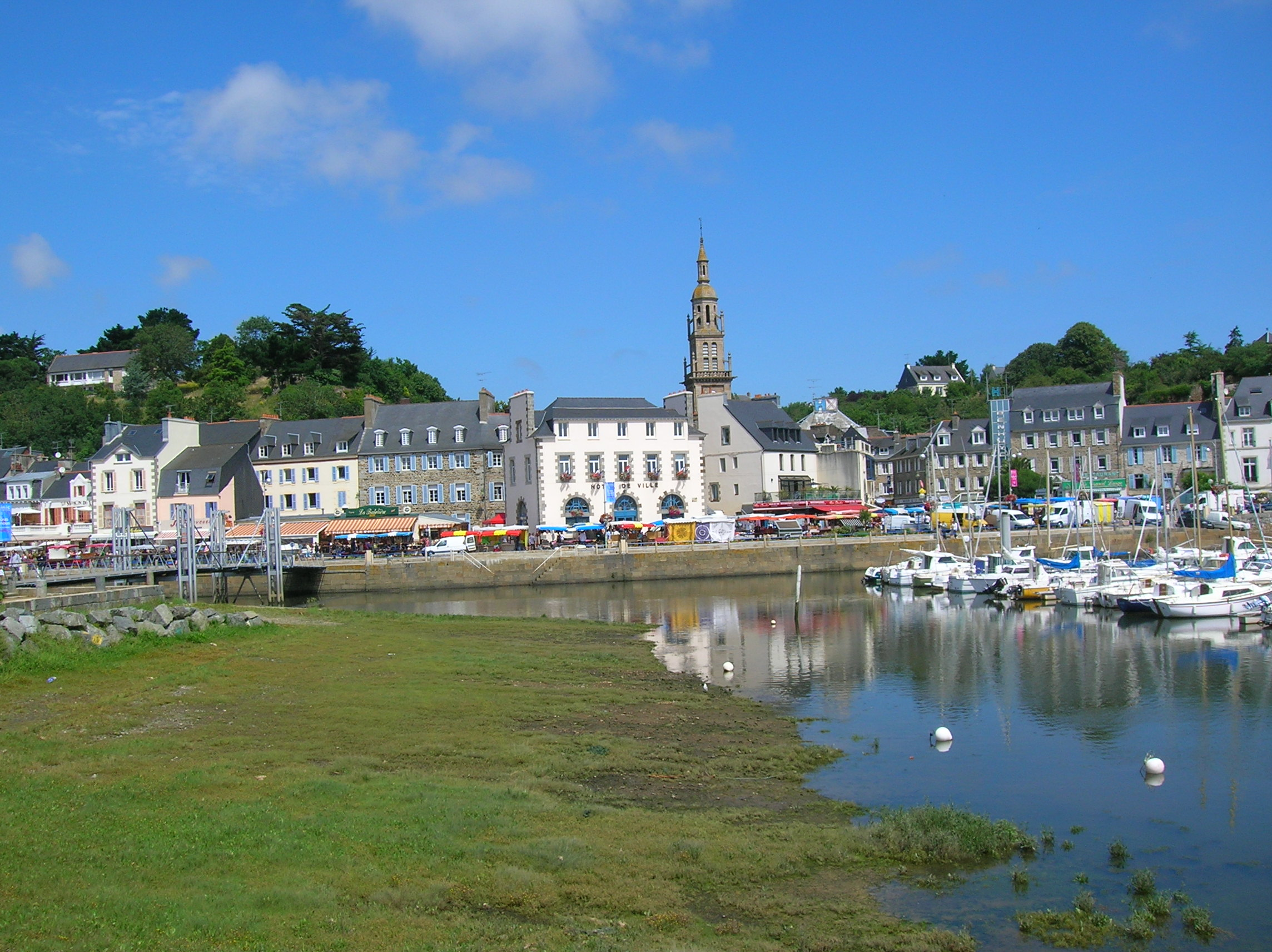 Binic, Côtes d'Armor, France : quai principal, partie centrale avec mairie (Main quay, center left with town hall)